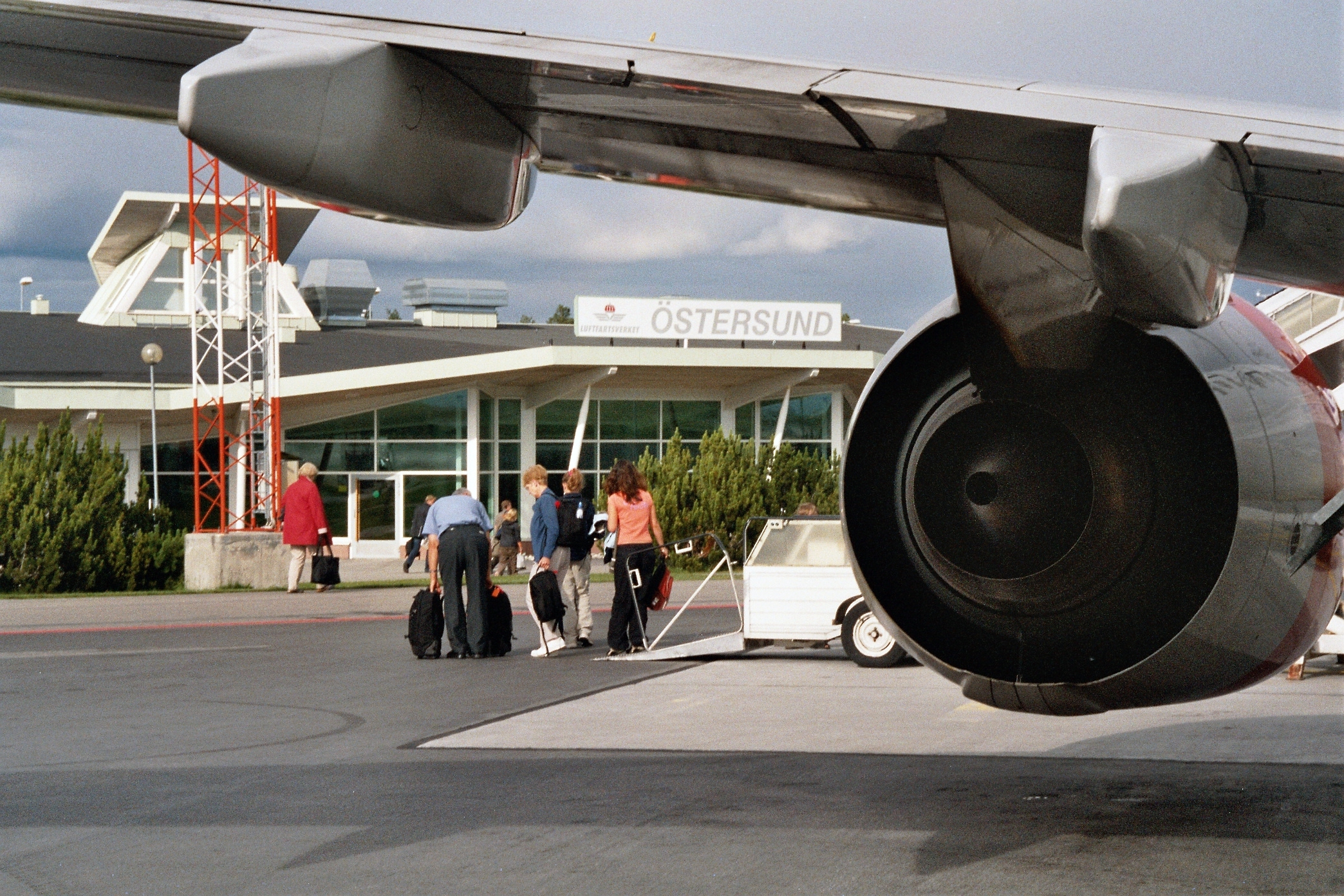 Bild: Flygplats Östersund